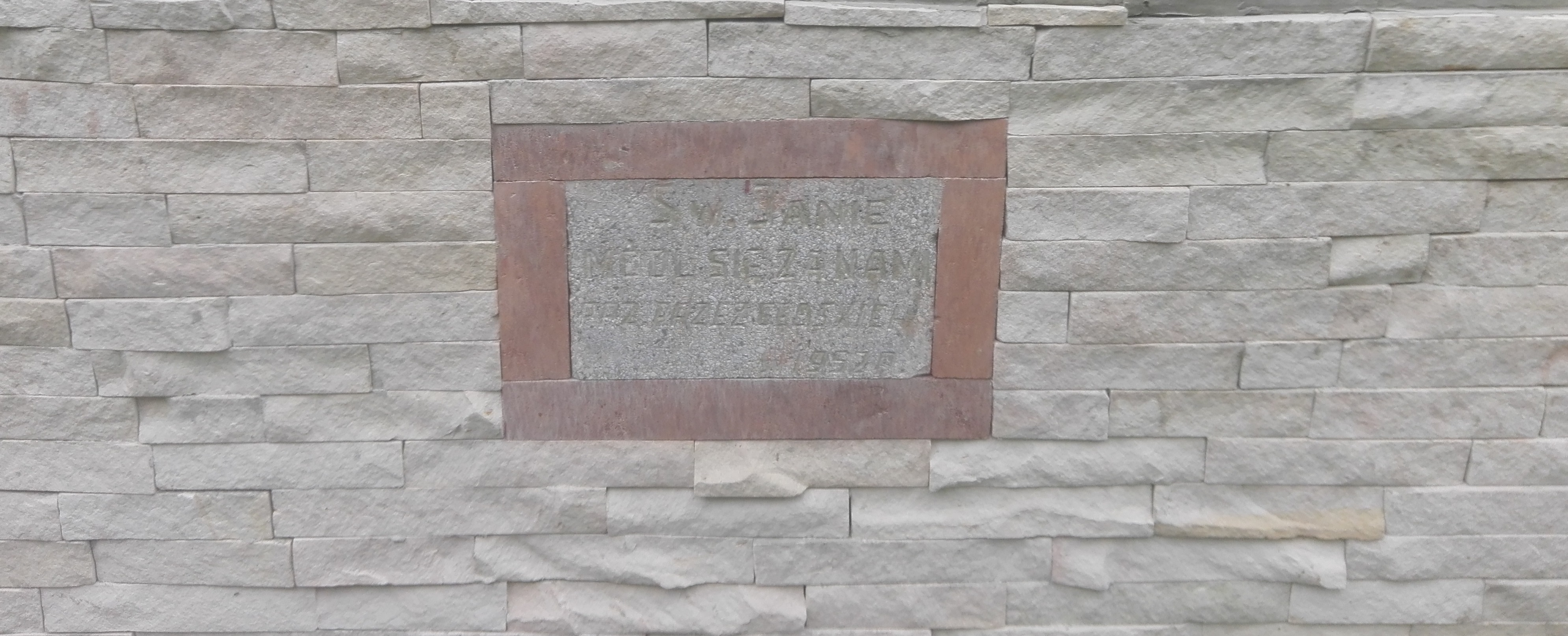 tablica pamiątkowa